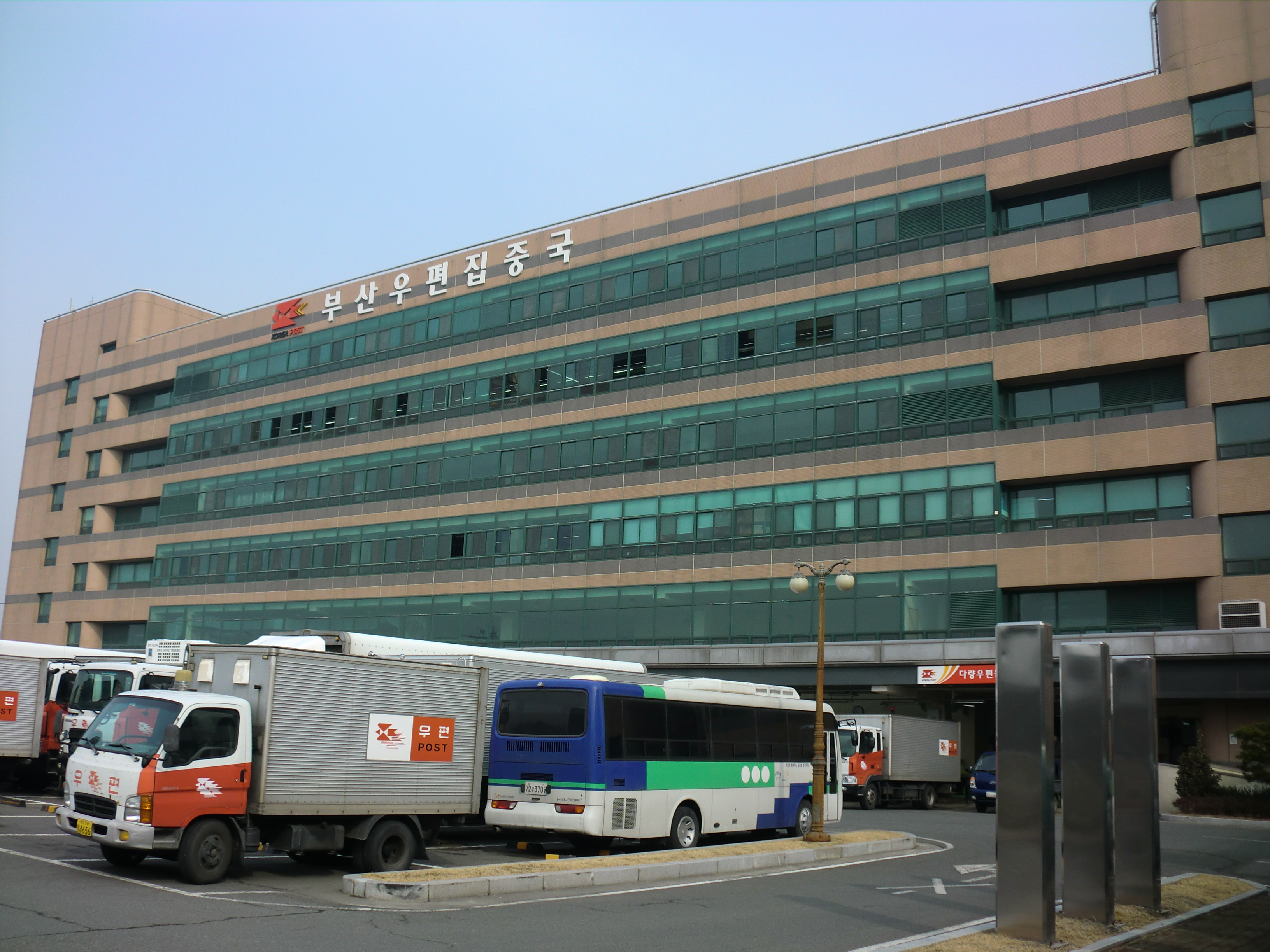 부산광역시 강서구에 있는 부산우편집중국